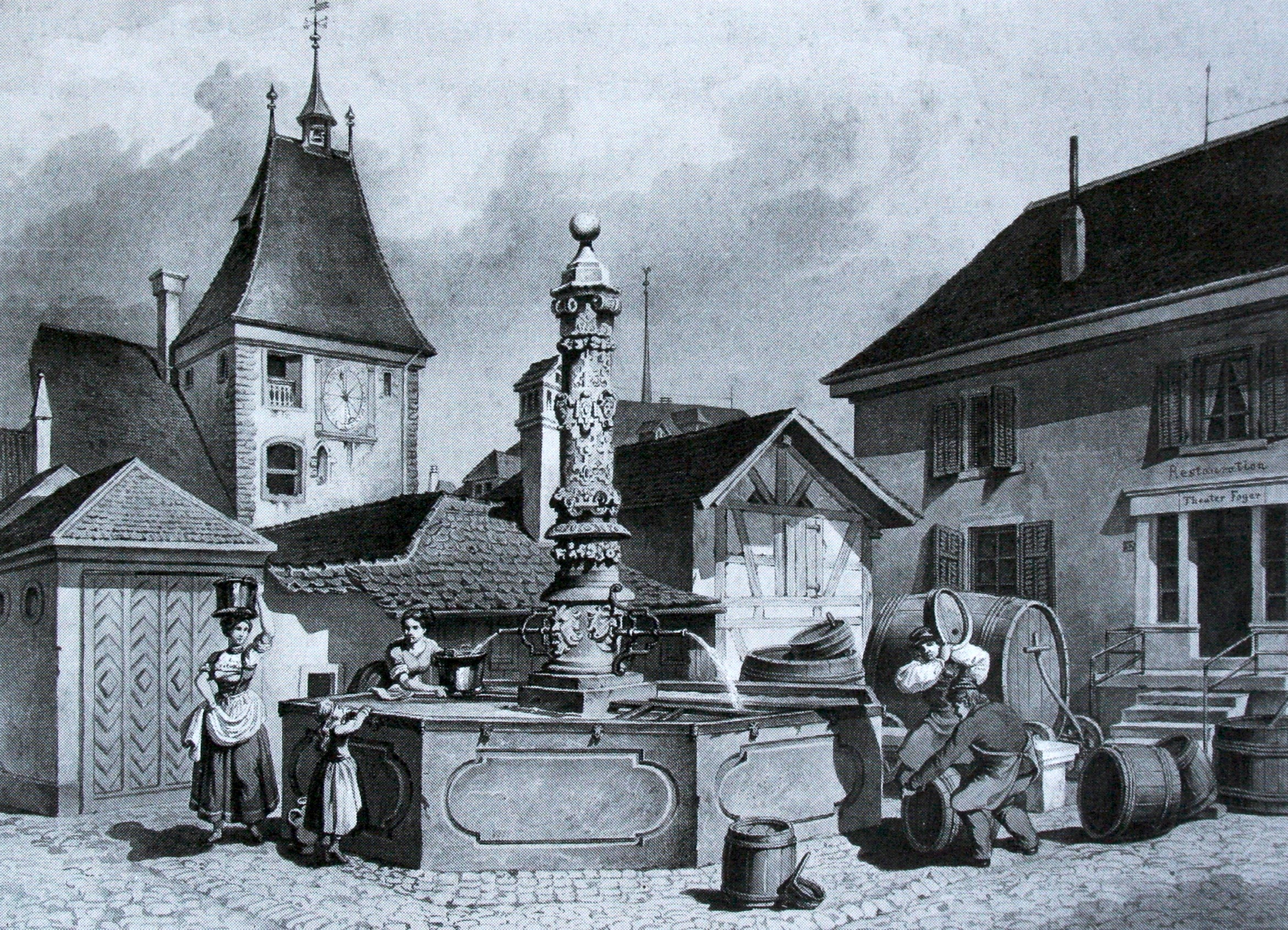 Barfüsserkloster: Brunnen im ehemaligen Friedhof. Rechts der Eingang zum Theater. Lavierte Federzeichnung von Johann Conrad Werdmüller, 1871